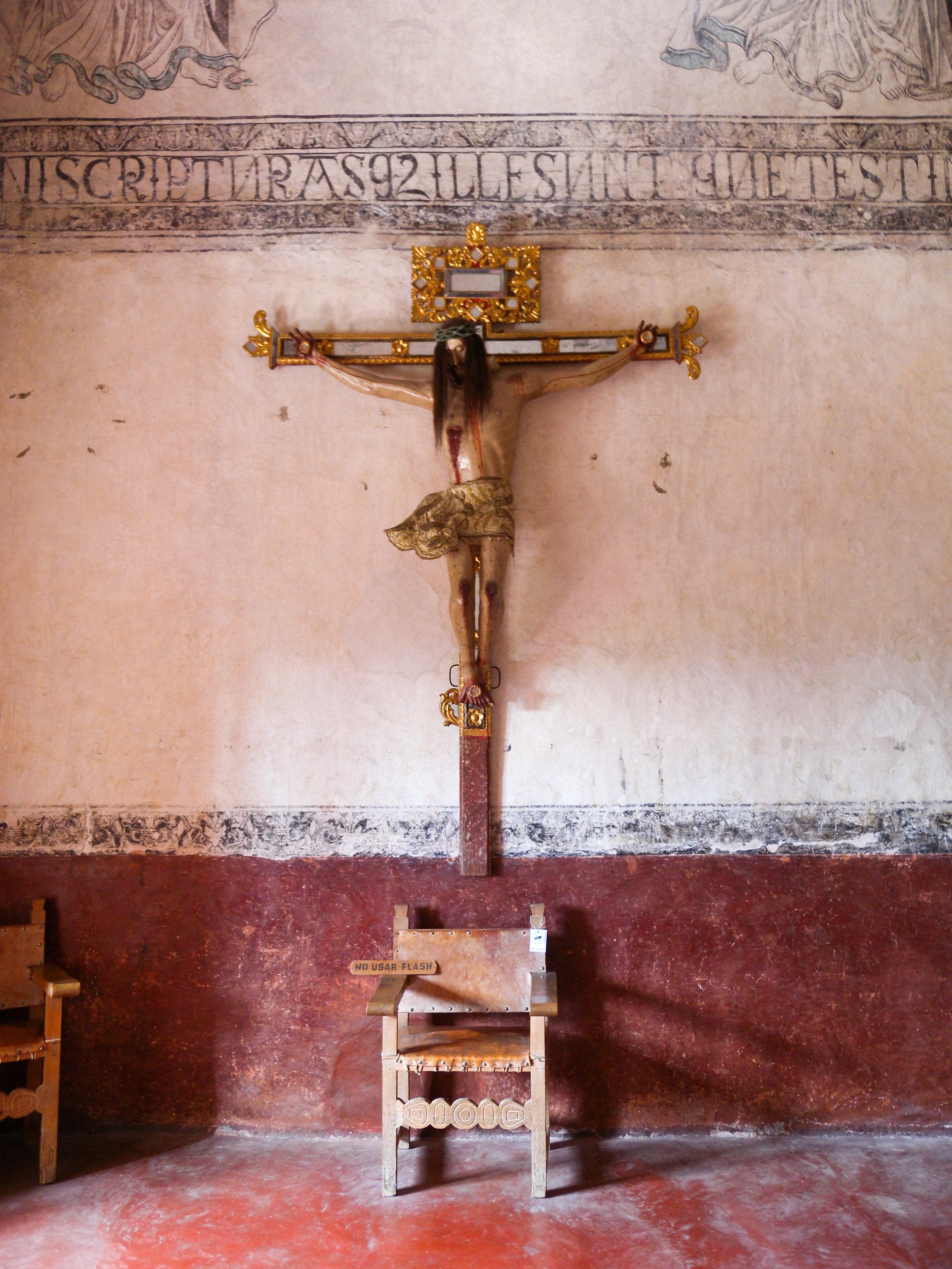 Convento de Actopan, Hidalgo.